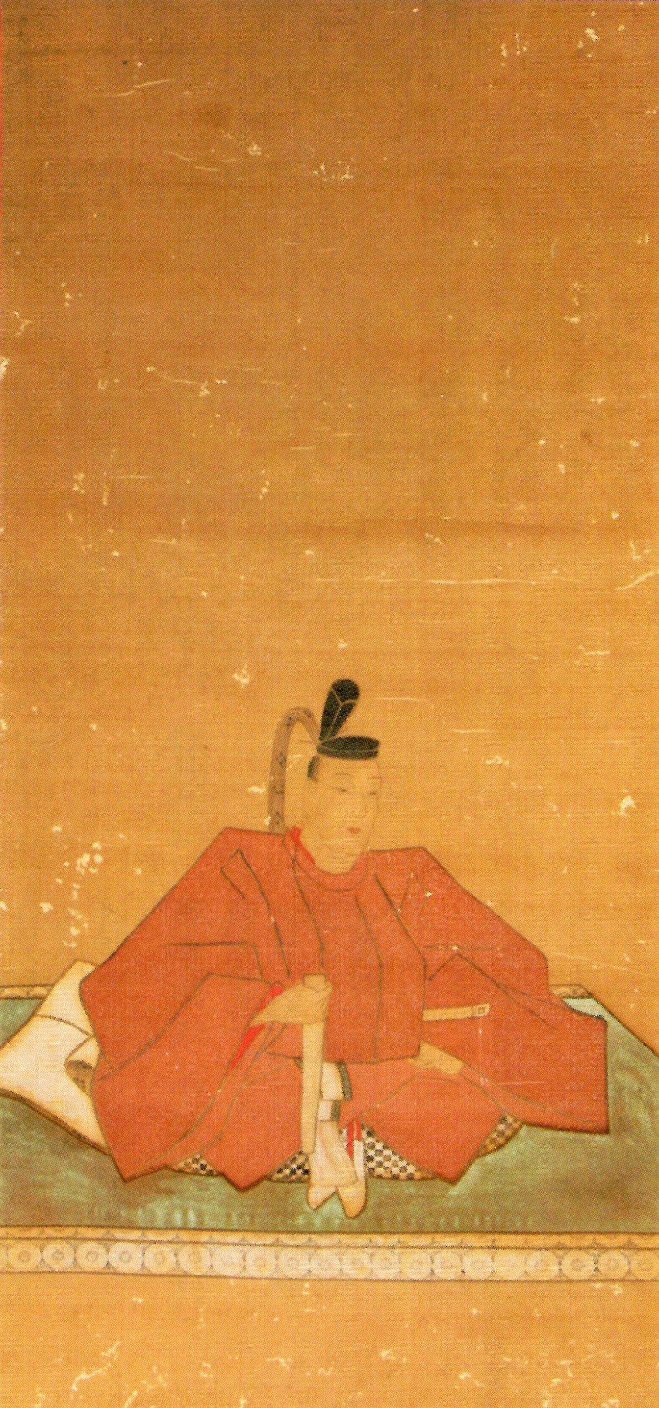 本多政昌の肖像。